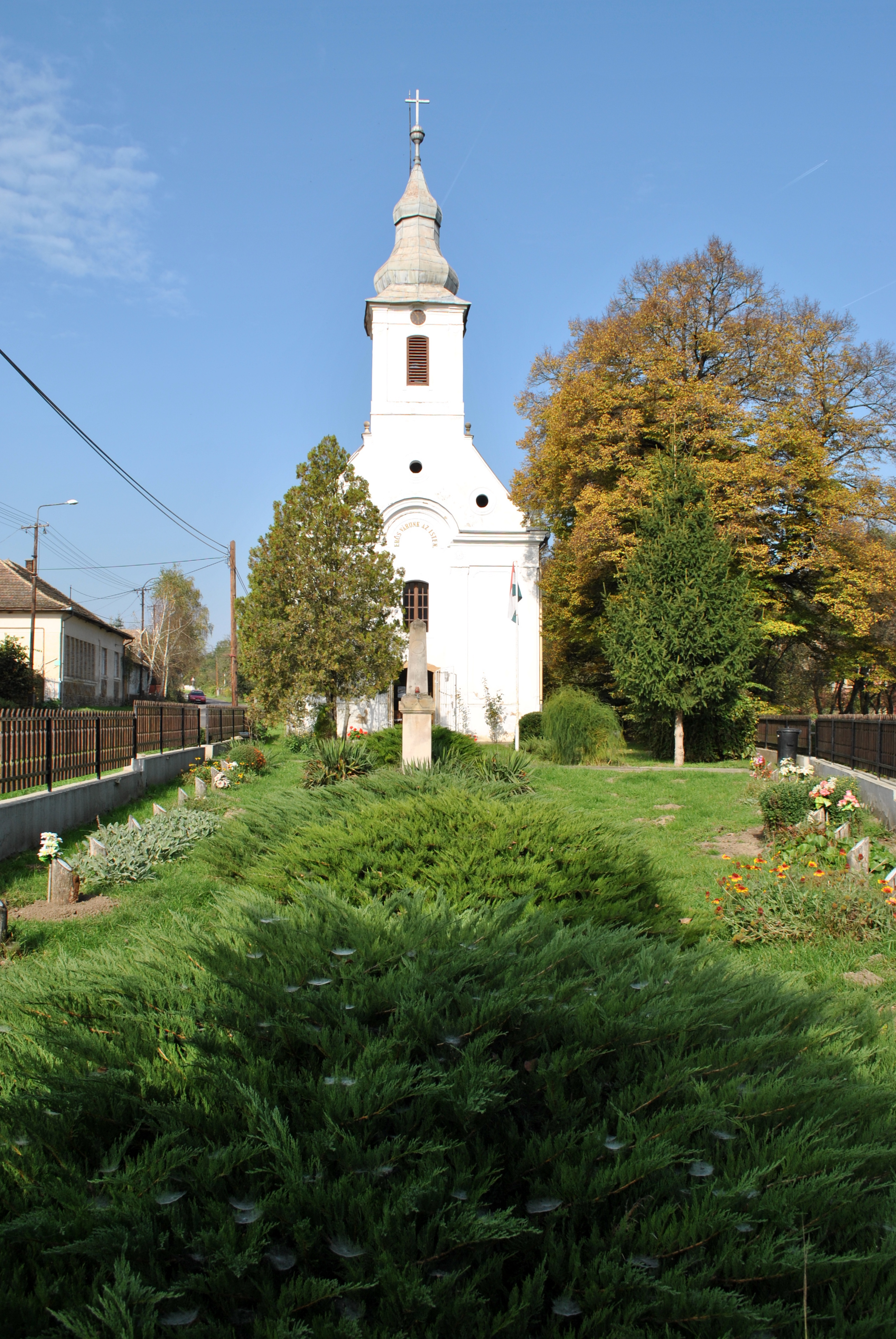 Kétbodony